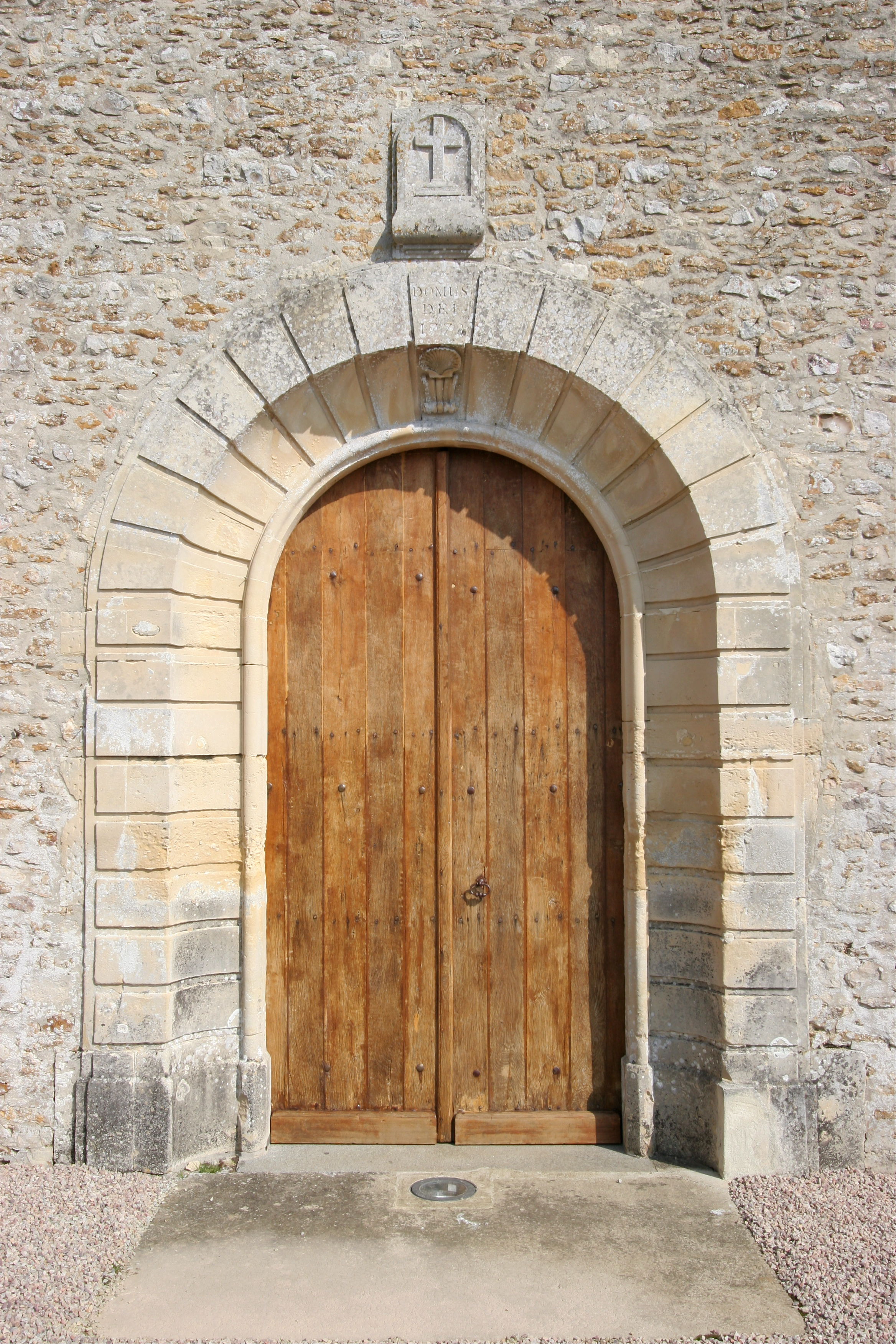 Porte de l'église Saint Cellerin de MEslay, Calvados, France. Au dessus de la porte se trouve une coquille St Jacques, la date d'une de la réfection de la façade occidentale (1773) et l'inscription latine "Domus Dei".